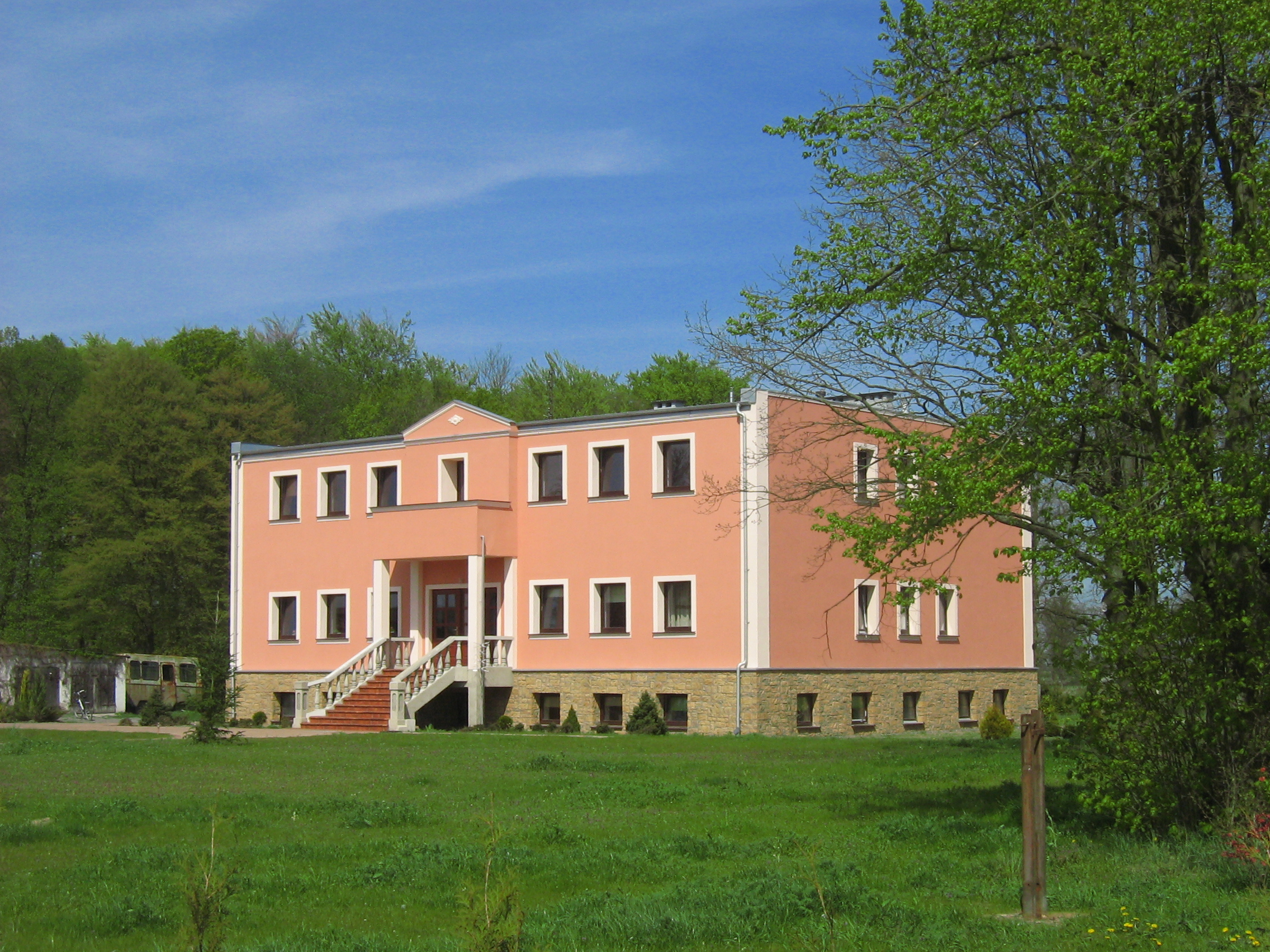 Dwór w Łuskowie